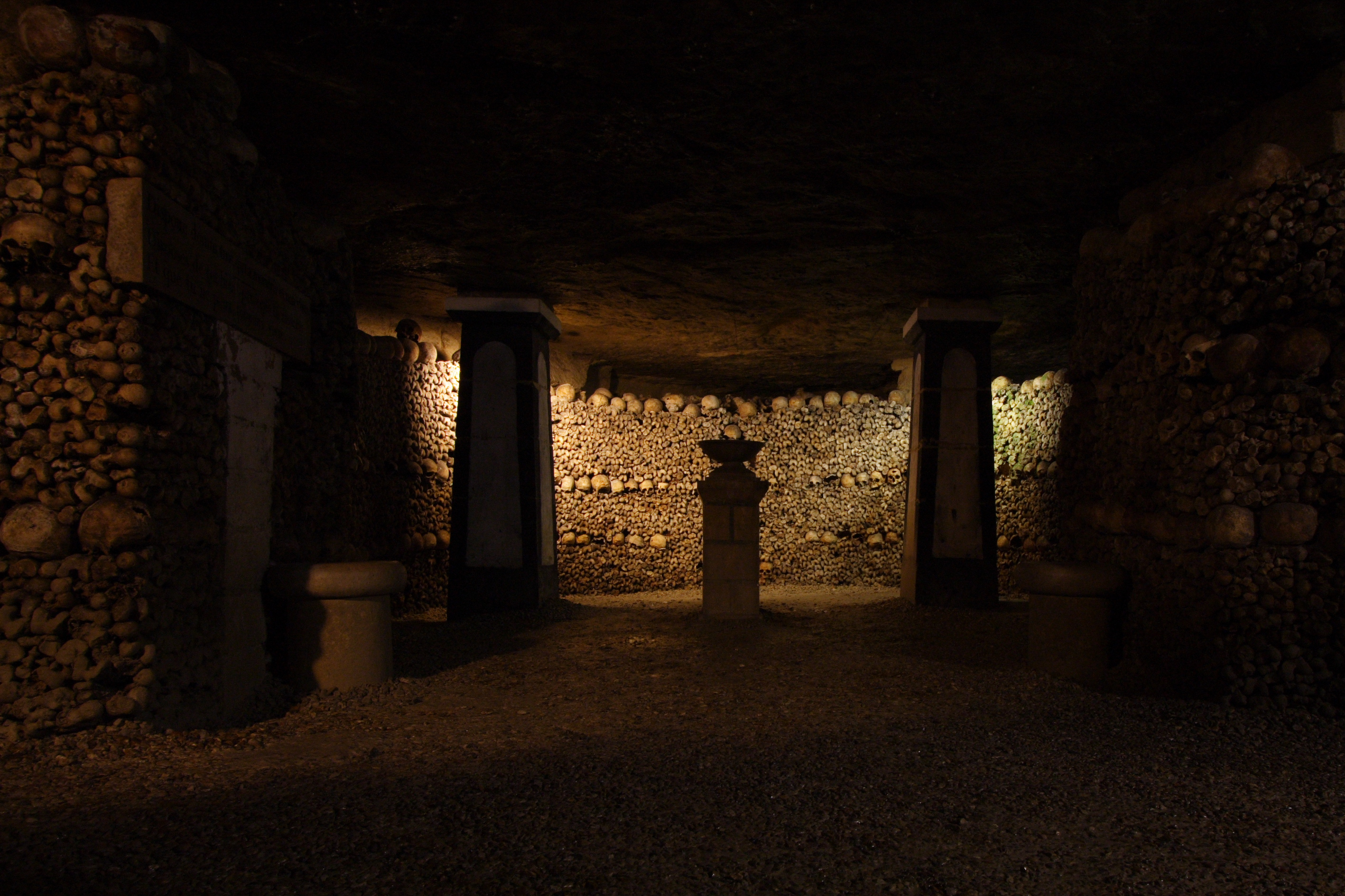 Catacombes de Paris(Paris, France)